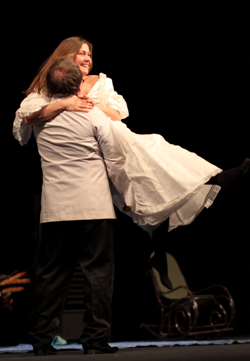 Владимир Стеклов и Мария Голубкина в спектакле «Любовь длинною в ночь» на сцене Северодвинского театра драмы